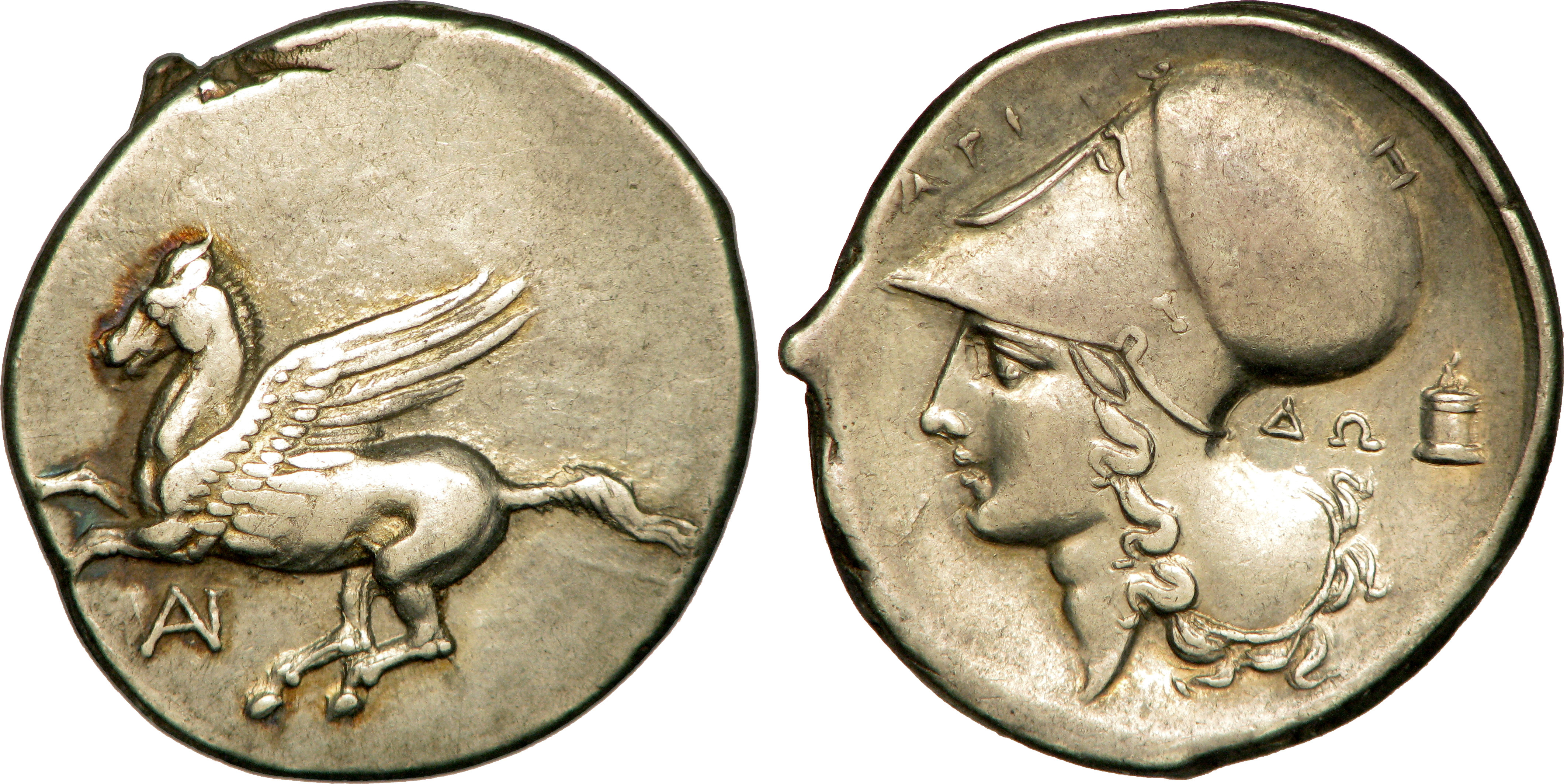 Nom de l'atelier : Acarnanie, Anactorium Métal : argent Diamètre : 23mm Axe des coins : 3h. Poids : 8,52g. Description avers : Pégase volant à gauche. Légende avers : (AN) Description revers : Tête d'Athéna à gauche, coiffée du casque corinthien ; derrière un autel circulaire allumé. Légende revers : ARI/ DW Traduction revers : (Anactorium).